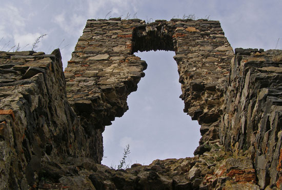 Губківський замок 3.jpg: Губківський замок